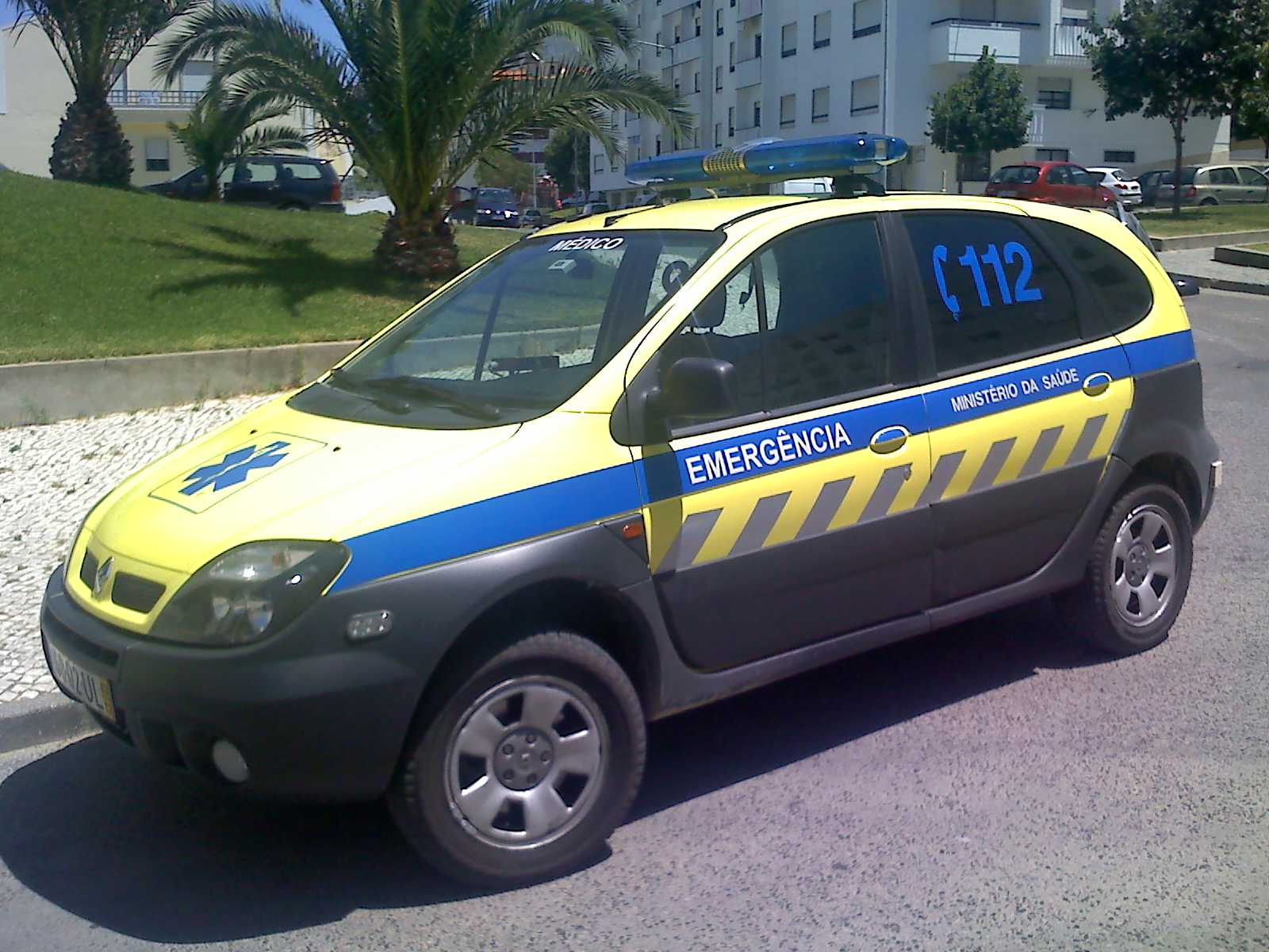 Medical Rescue Vehicle - INEM Portugal